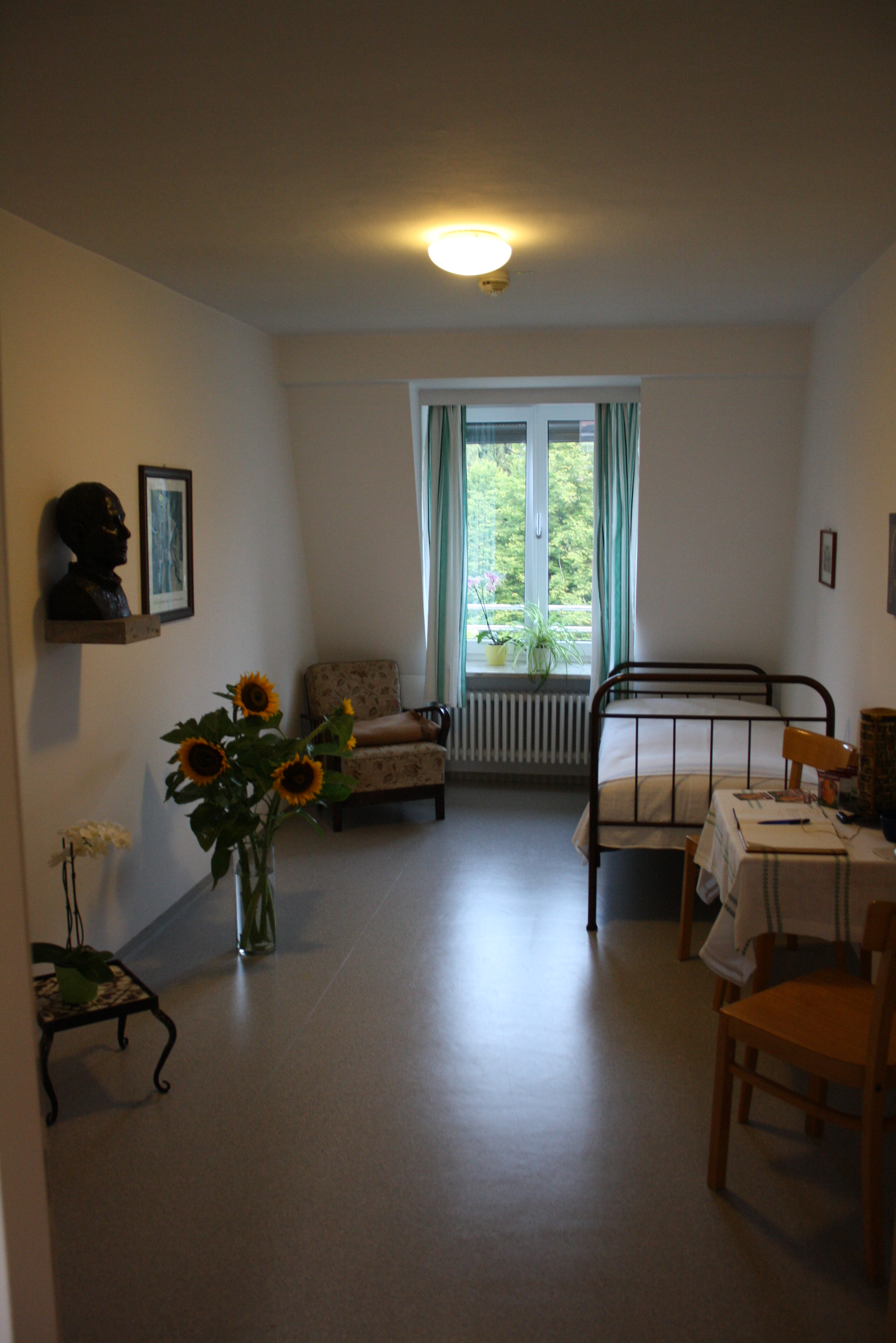 Das Zimmer im Waldsanatorium Planegg, in dem Karl Leisner starb.